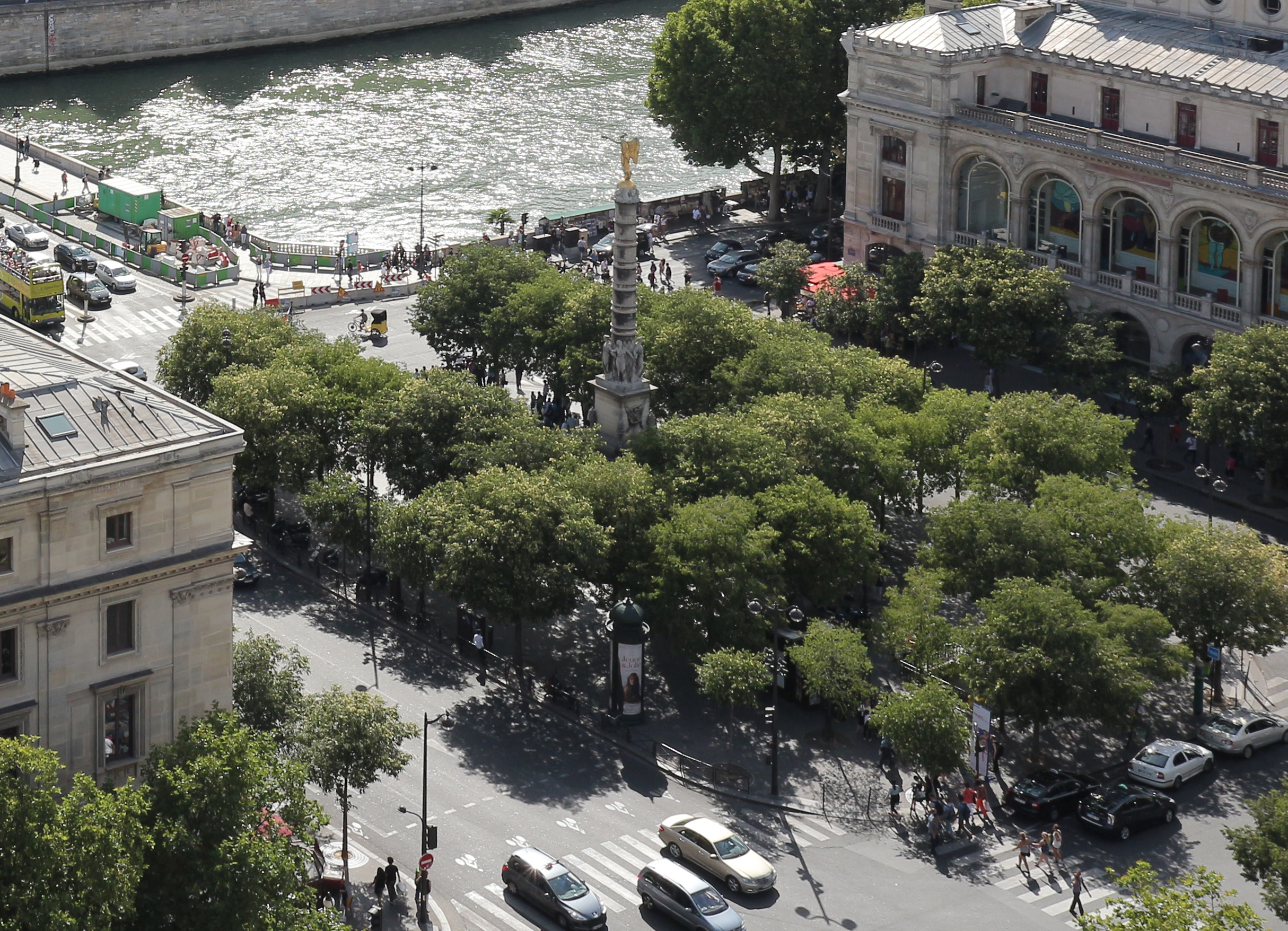 La Place du Châtelet vue depuis le sommet de la tour Saint-Jacques, Paris, France.